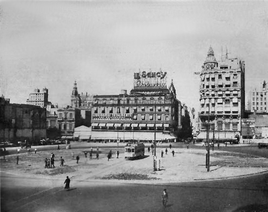 La Plaza de la República, Buenos Aires, en 1936, antes de la construcción del obelisco